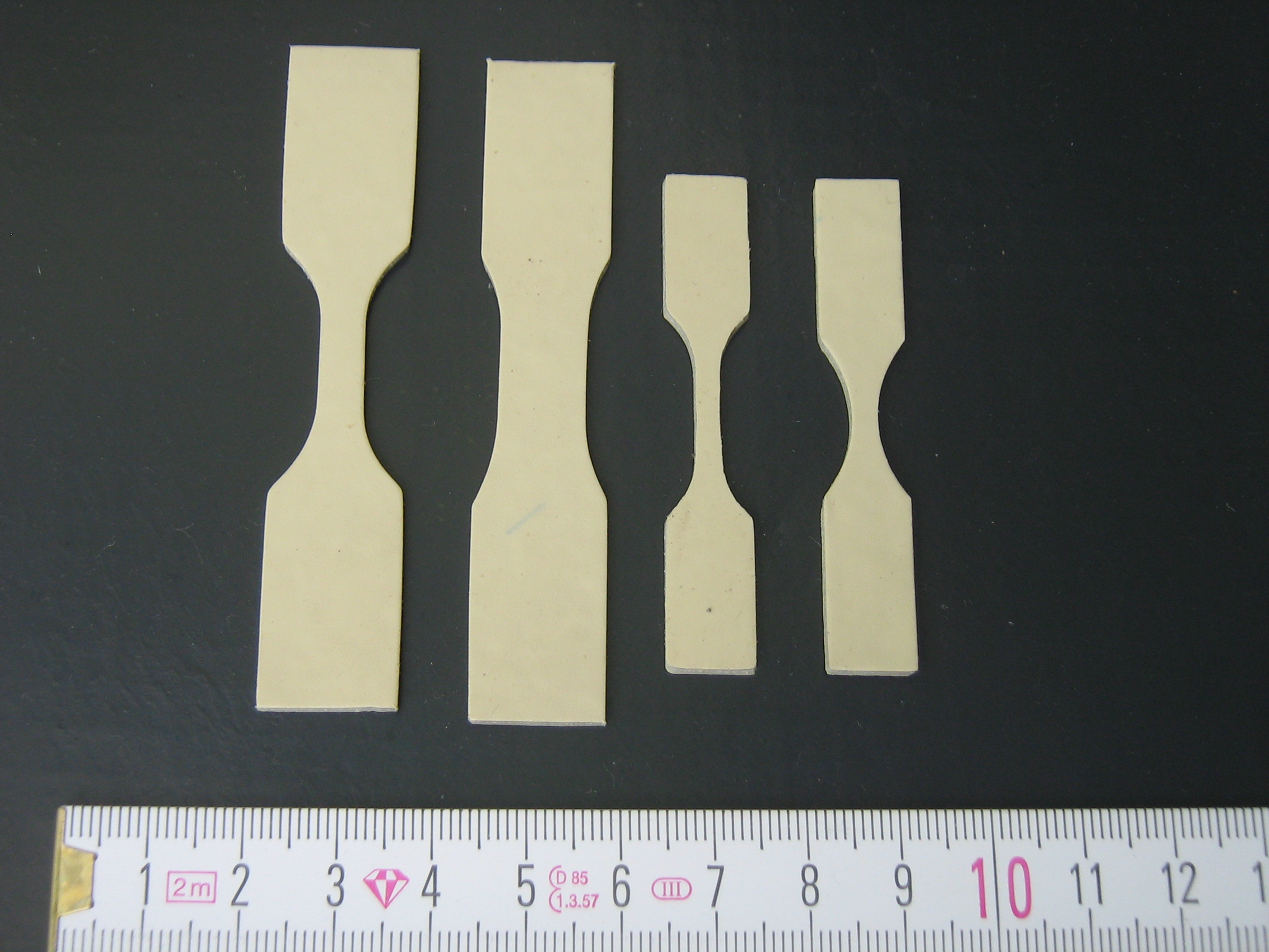 Prüfkörper für Schlagzugprüfungen